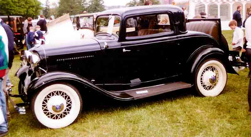 Ford Model 18 520 De Luxe Coupé 1932